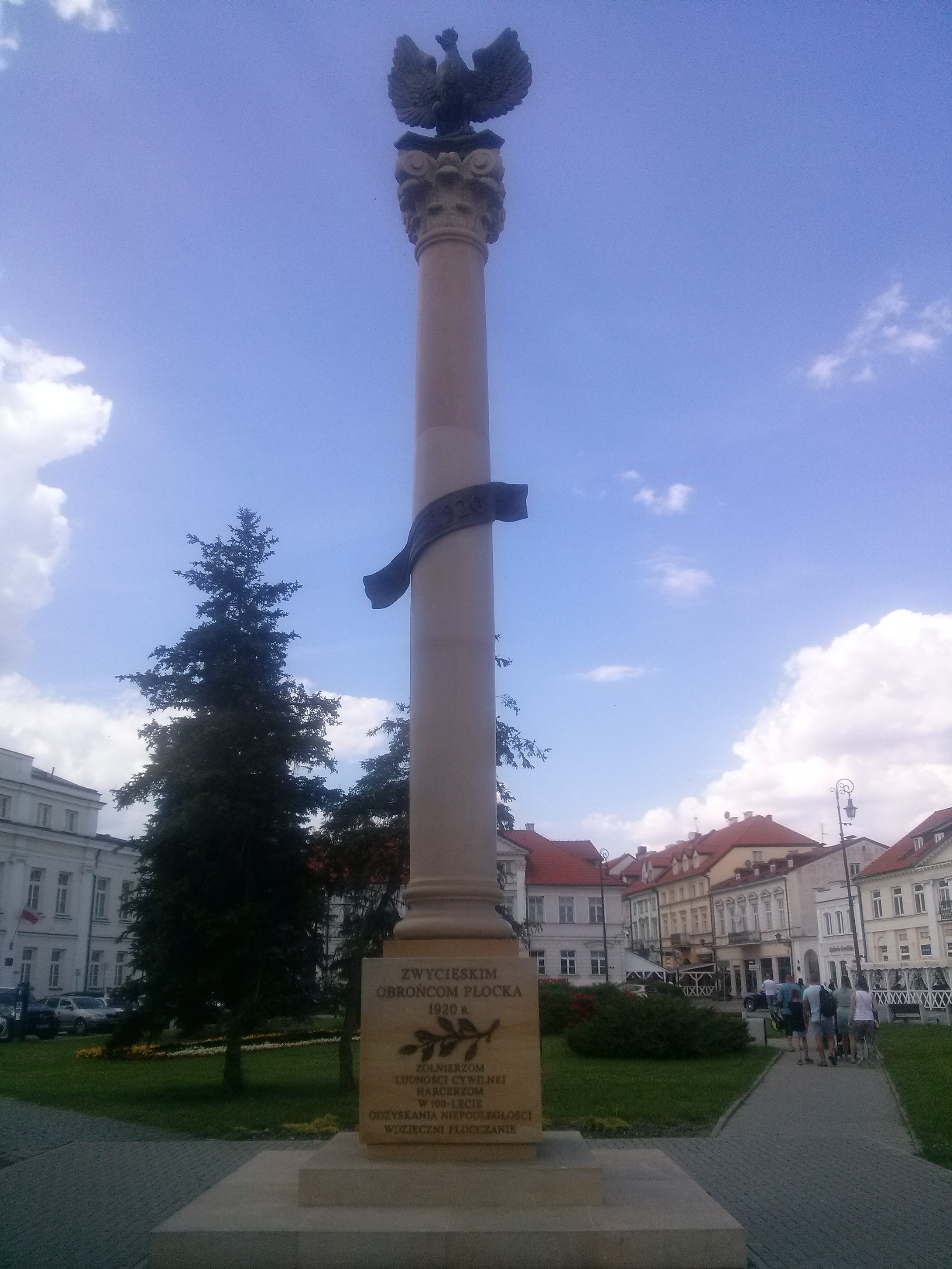 Pomnik Obrońców Płocka 1920 na placu Narutowicza w Płocku.